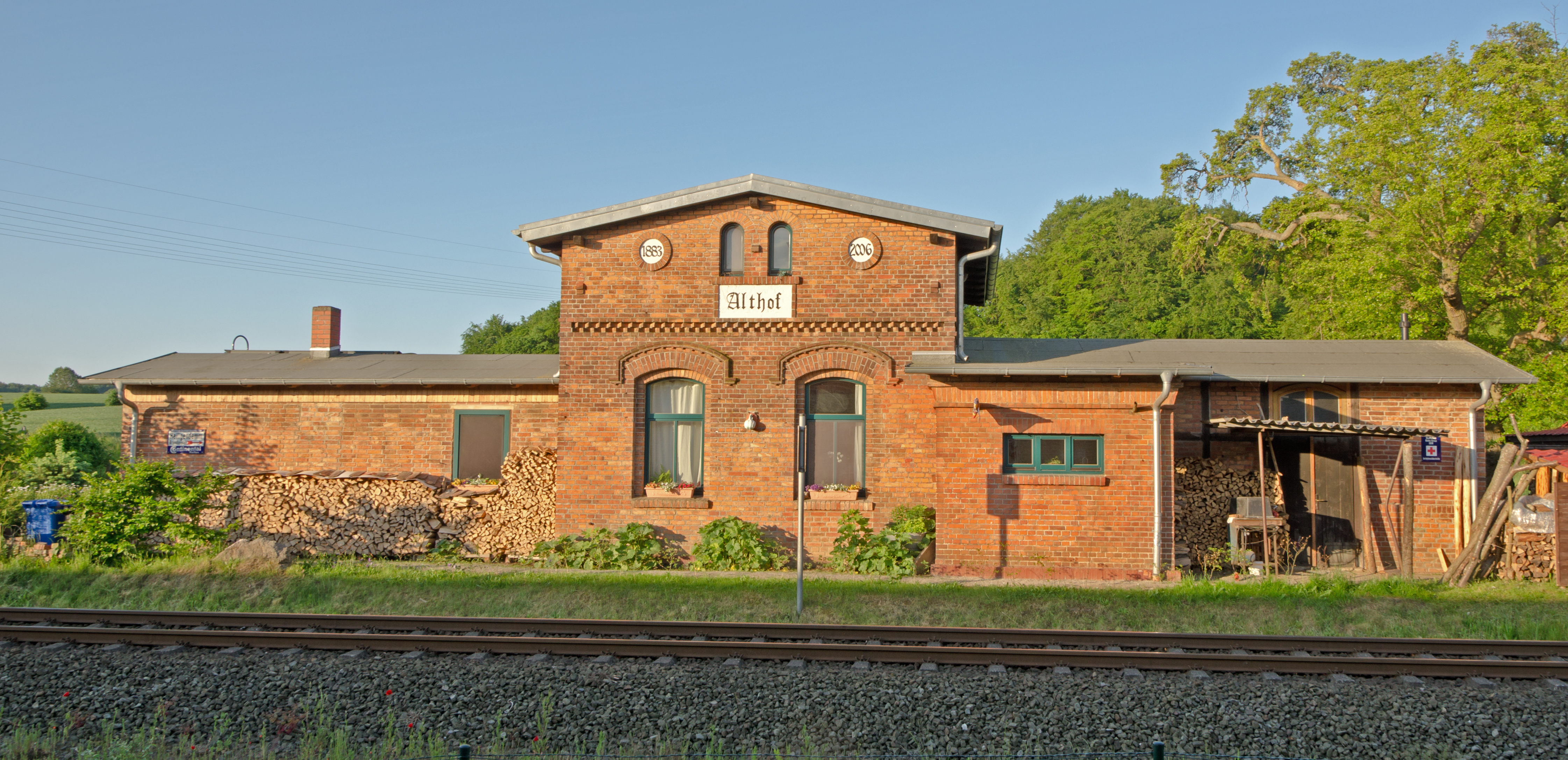 Bahnhof Althof, ehemaliges Bahnhofsgebäude - heute genutzt als Wohnhaus